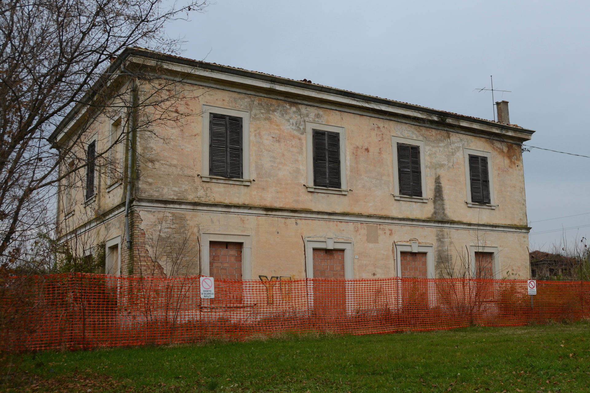 Stazione abbandonata di Sesto al Reghena